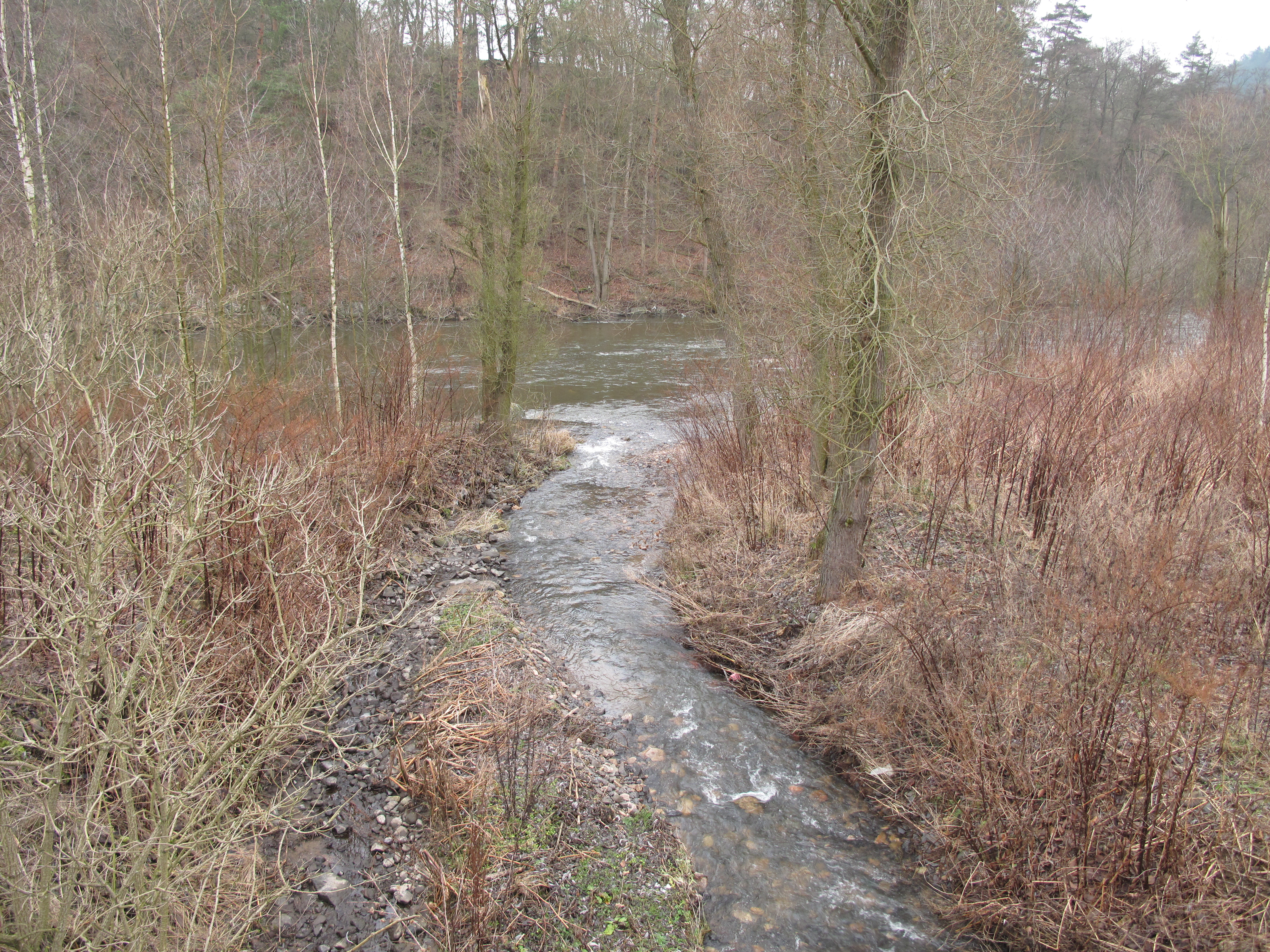 Soutok Lučinského potok s Ohří v Dubině. Okres Karlovy Vary, Česká republika.